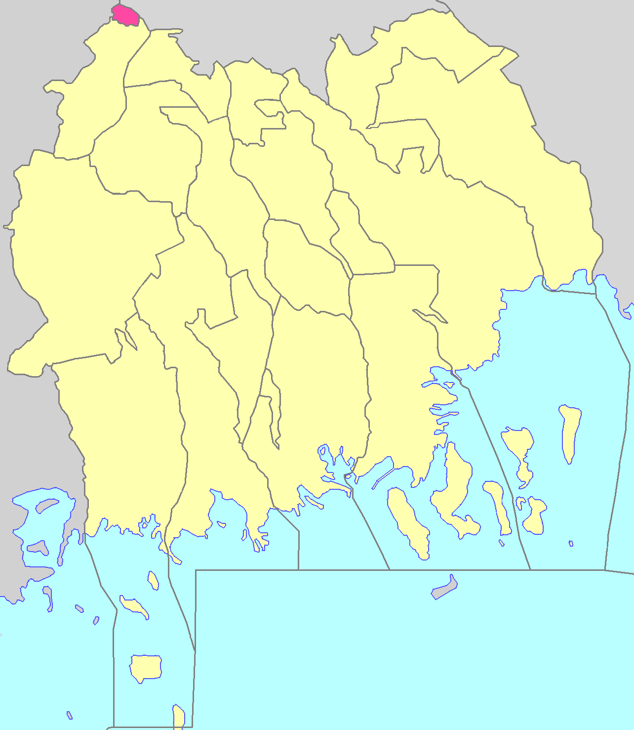 Волго-Каспійське міське поселення